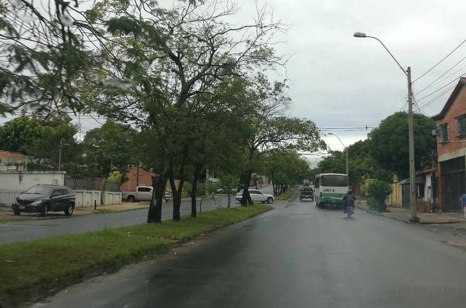 Avenida Brasilia, Asunción, Paraguay